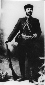 Йоанис Гарезос